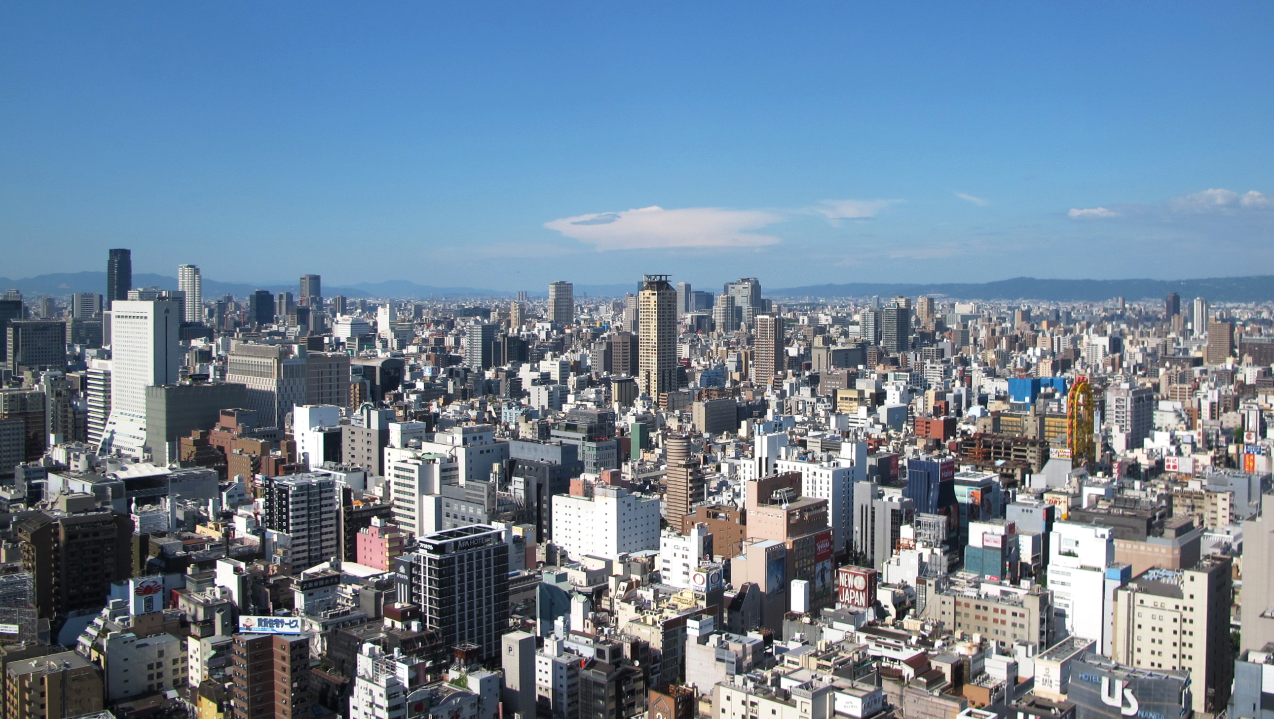 Chuo-ku Osaka